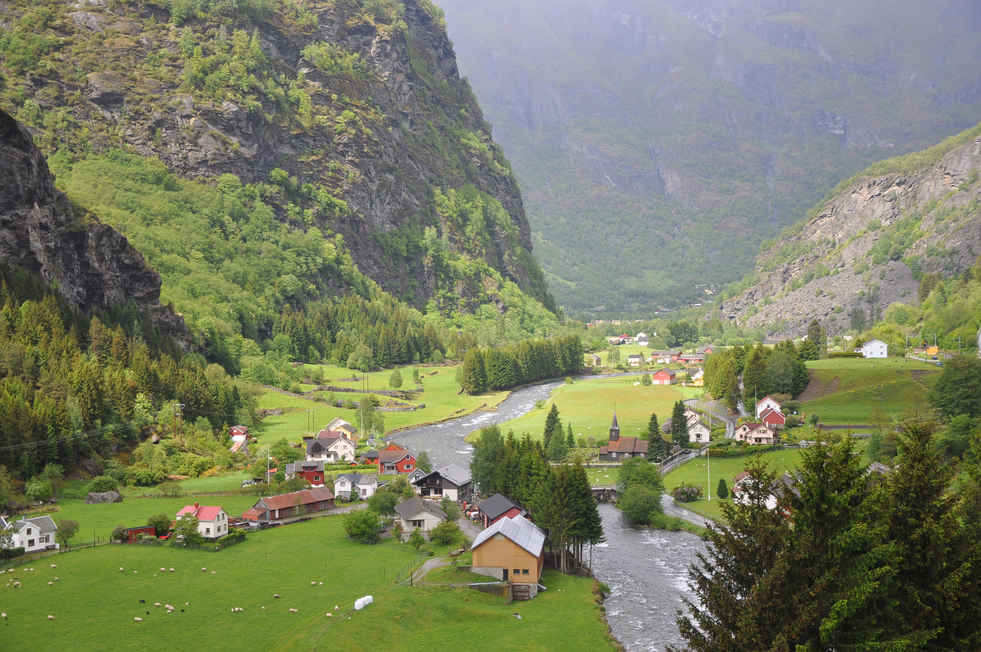 Flåm med Flåmselvi, Flåm kyrkje og sauer på beite, fotografert frå Flåmsbana